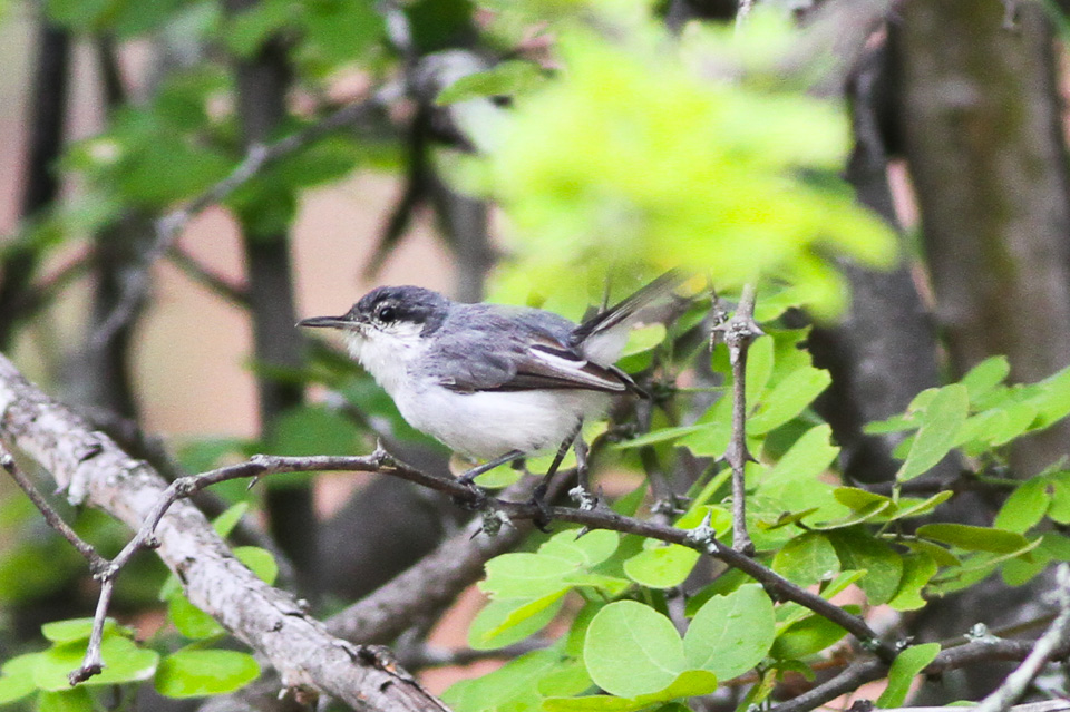 Tatacoa Desert